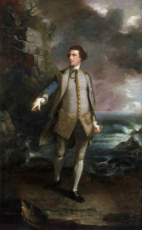 lived 1725-86